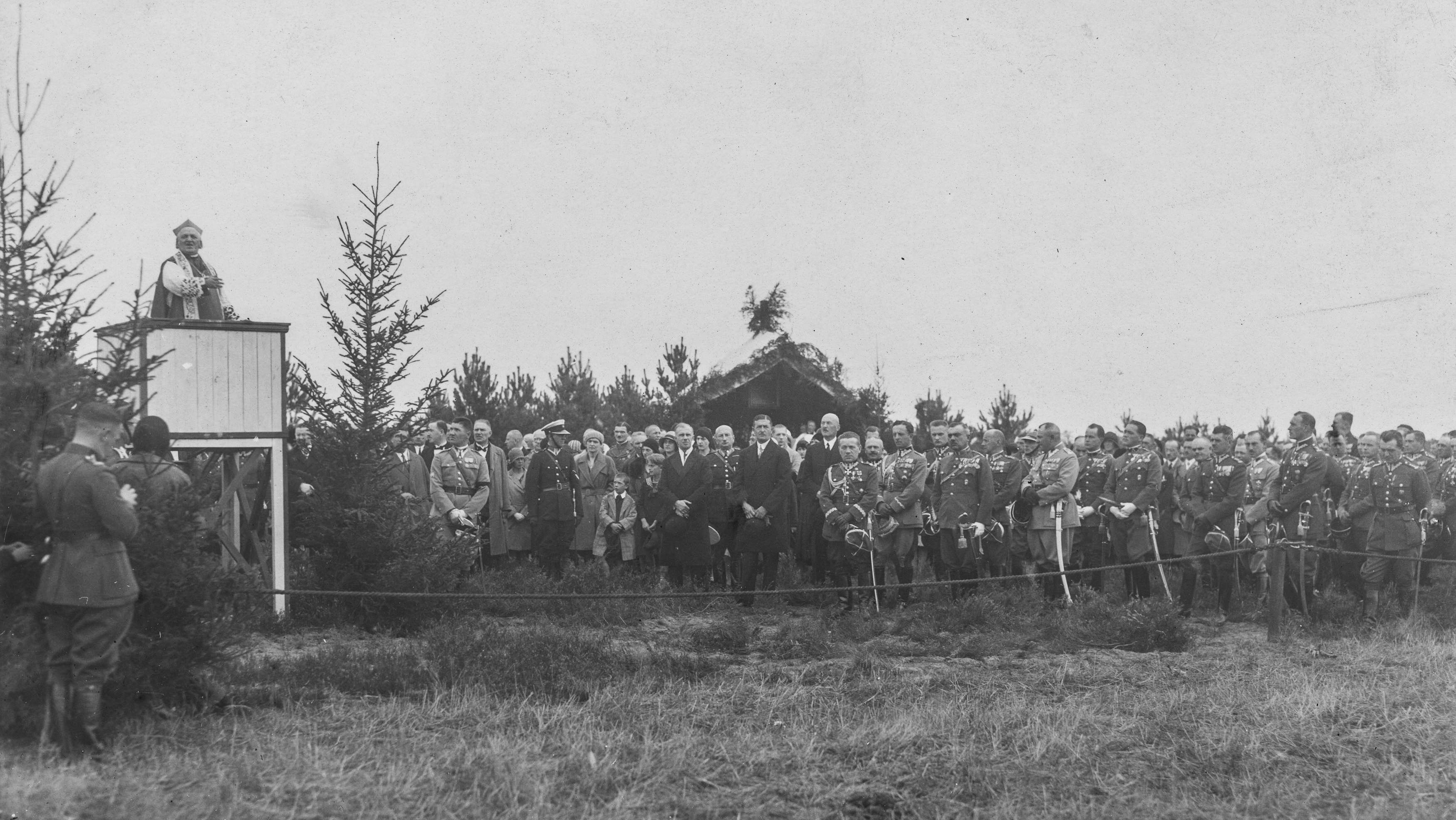 X - lecie 9 Dywizjonu Artylerii Konnej w Baranowiczach. Biskup polowy wojsk Litwy Środkowej Władysław Bandurski wygłasza kazanie podczas mszy polowej, z okazji 10 rocznicy powstania 9 DAK-u. Koncern Ilustrowany Kurier Codzienny - Archiwum Ilustracji. Sygnatura: 1-W-1483